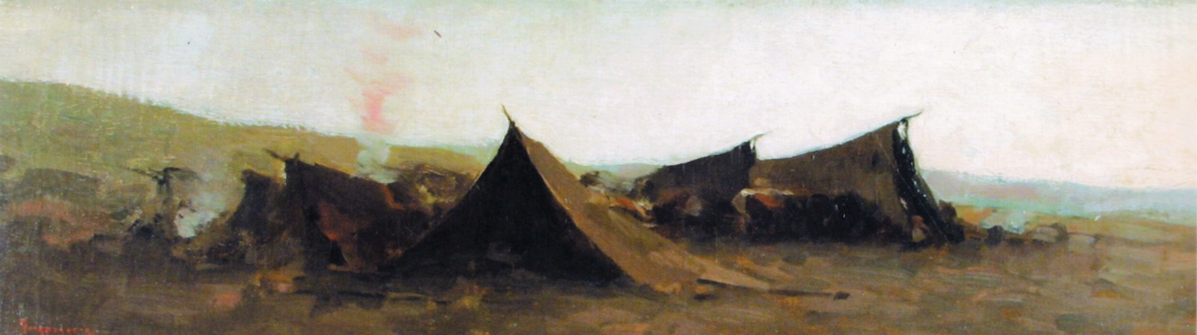 Corturile, ulei/pânză, 20x76cm, nedatat, semnat stânga jos cu roșu: Grigorescu